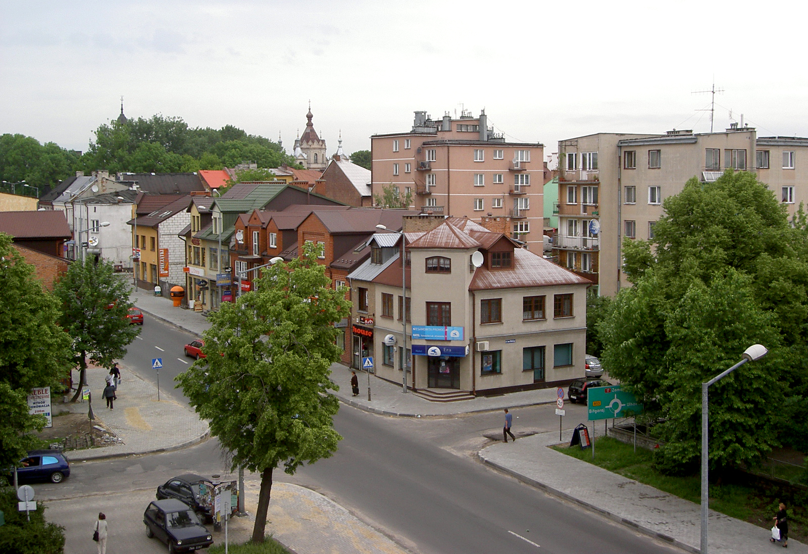 Tomaszów Lubelski, Poland • Centrum / City centre, Widok z hotelu LAUREAT